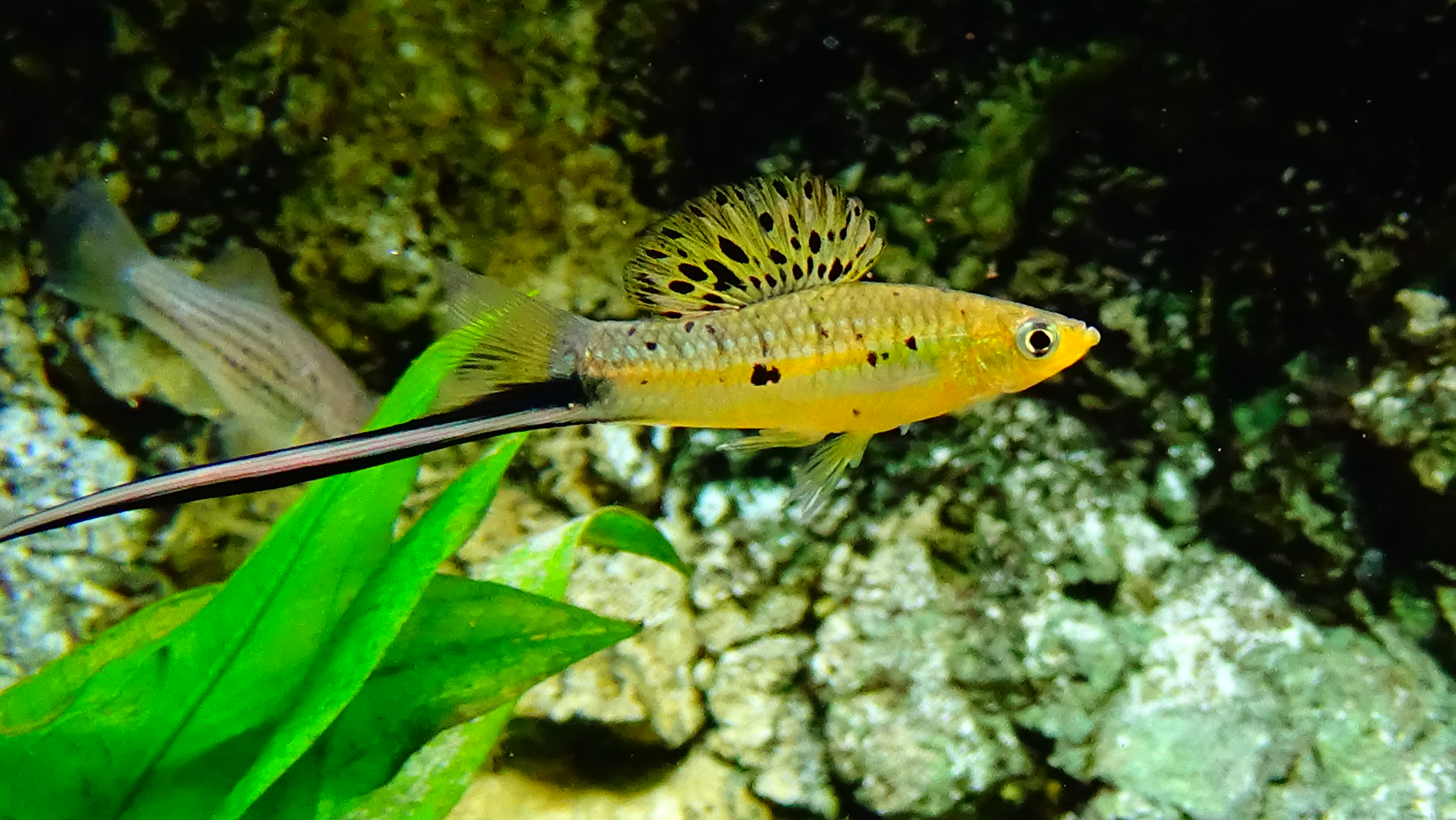 Xiphophorus montezumae (mâle) - Aquarium Tropical du Palais de la Porte Dorée - Paris/France - 29/04/2015